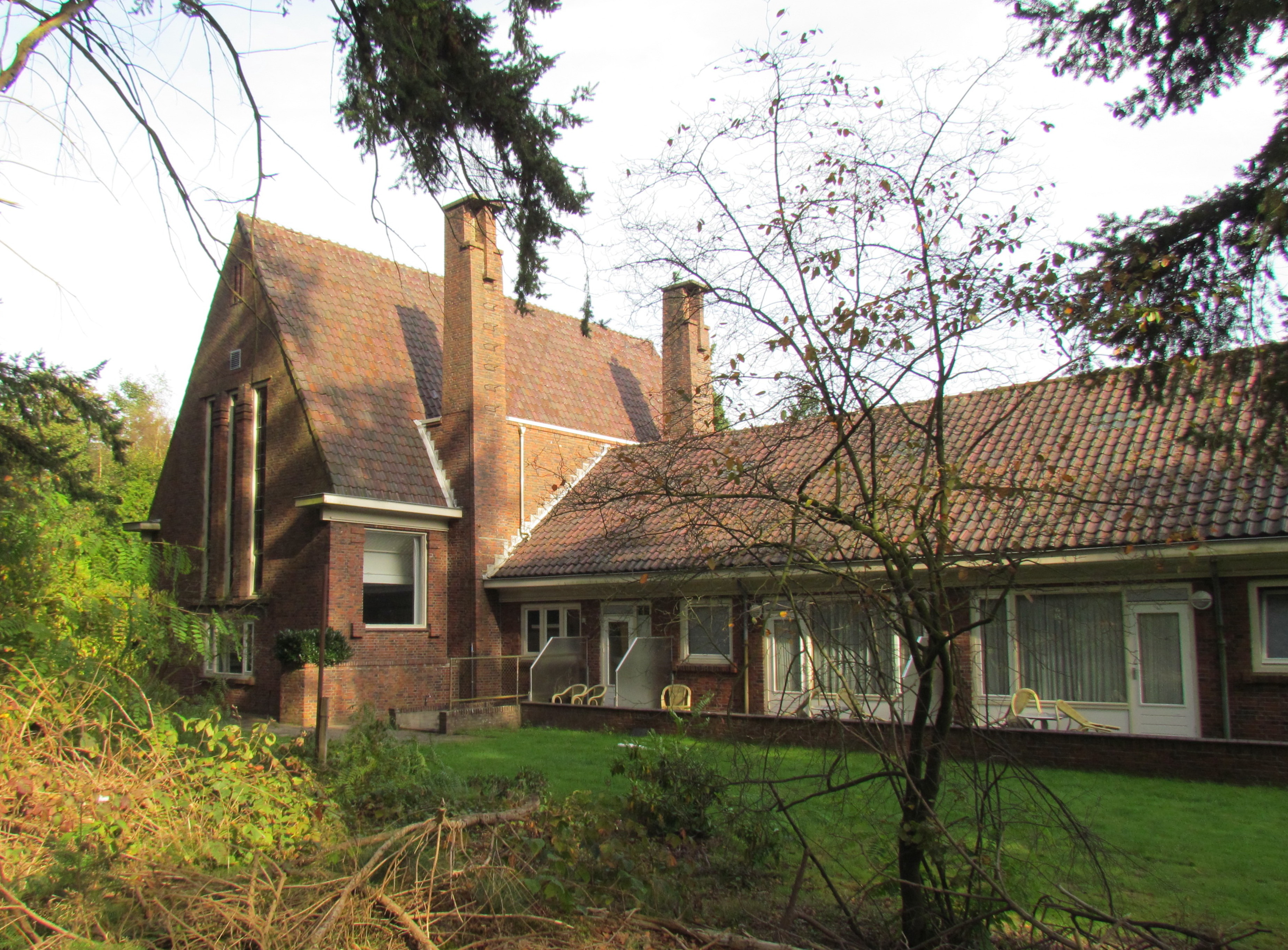 Een van de zijvleugels van het Troelstra-oord te Beekbergen (NL, 1927). Het hoofdgebouw brandde in 1955 af, maar de twee zijvleugels bleven overeind en vormen nu samen met een nieuw middengedeelte een commercieel hotel.